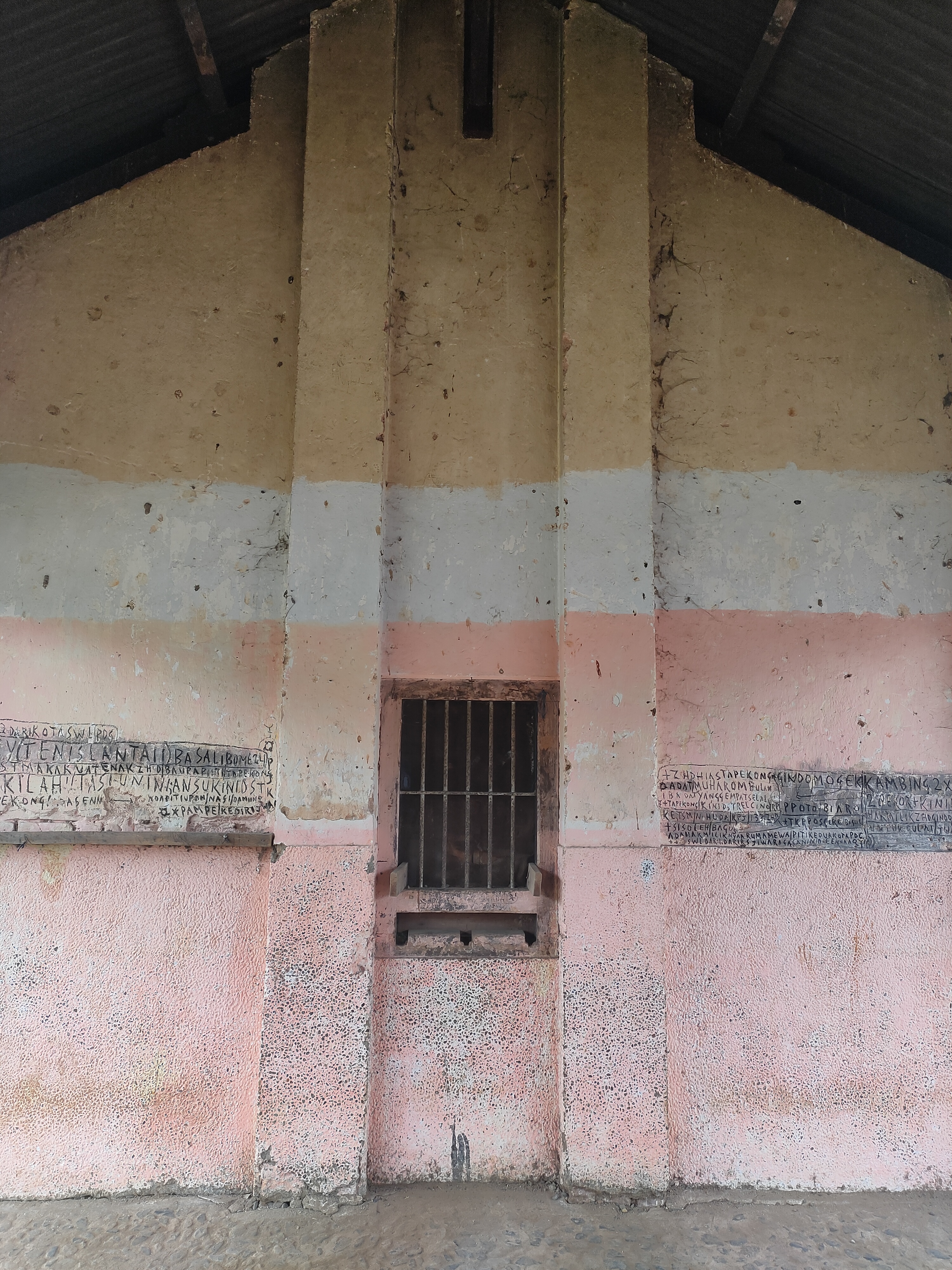 Stasiun Tanjung Ampalu pada tahun 2020 di Jorong Batu Gondang, Kecamatan Koto VII, Kabupaten Sijunjung, Sumatera Barat